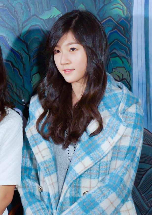 140227 '만수' VIP 시사회 김새론